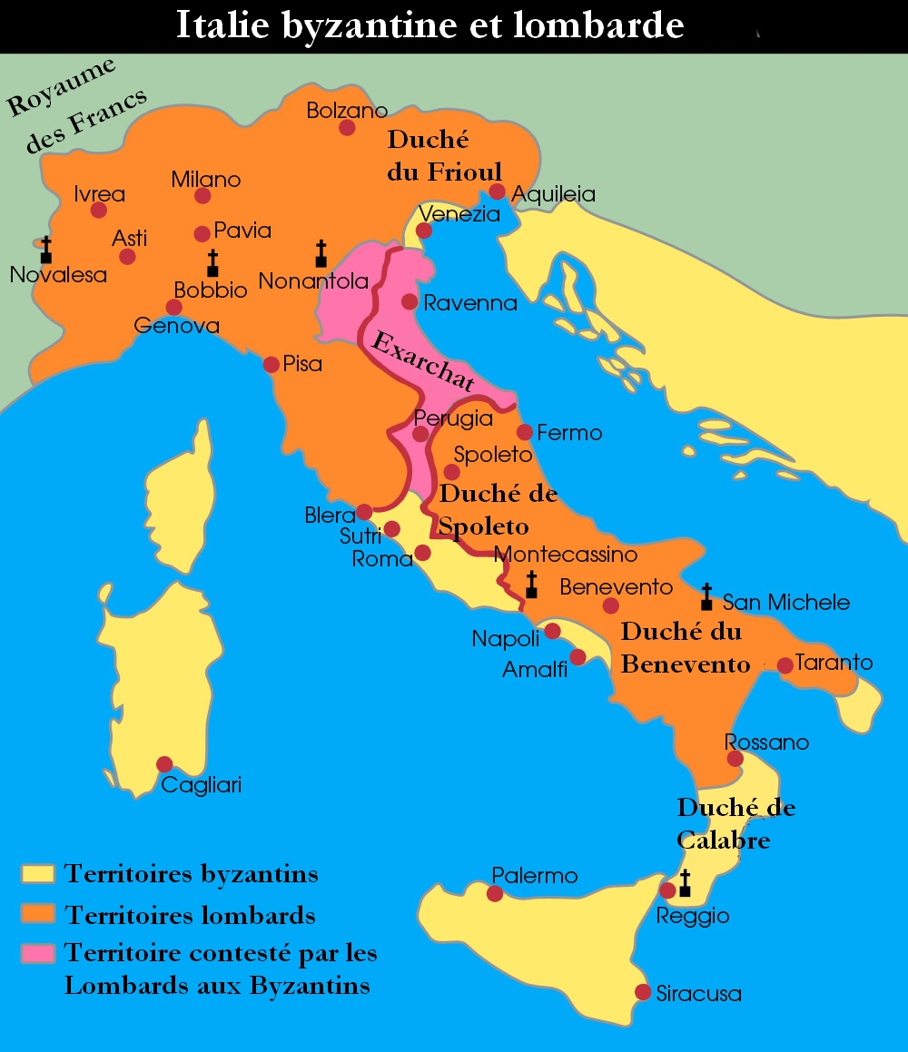 Italie au cours de la période byzantine et lombarde